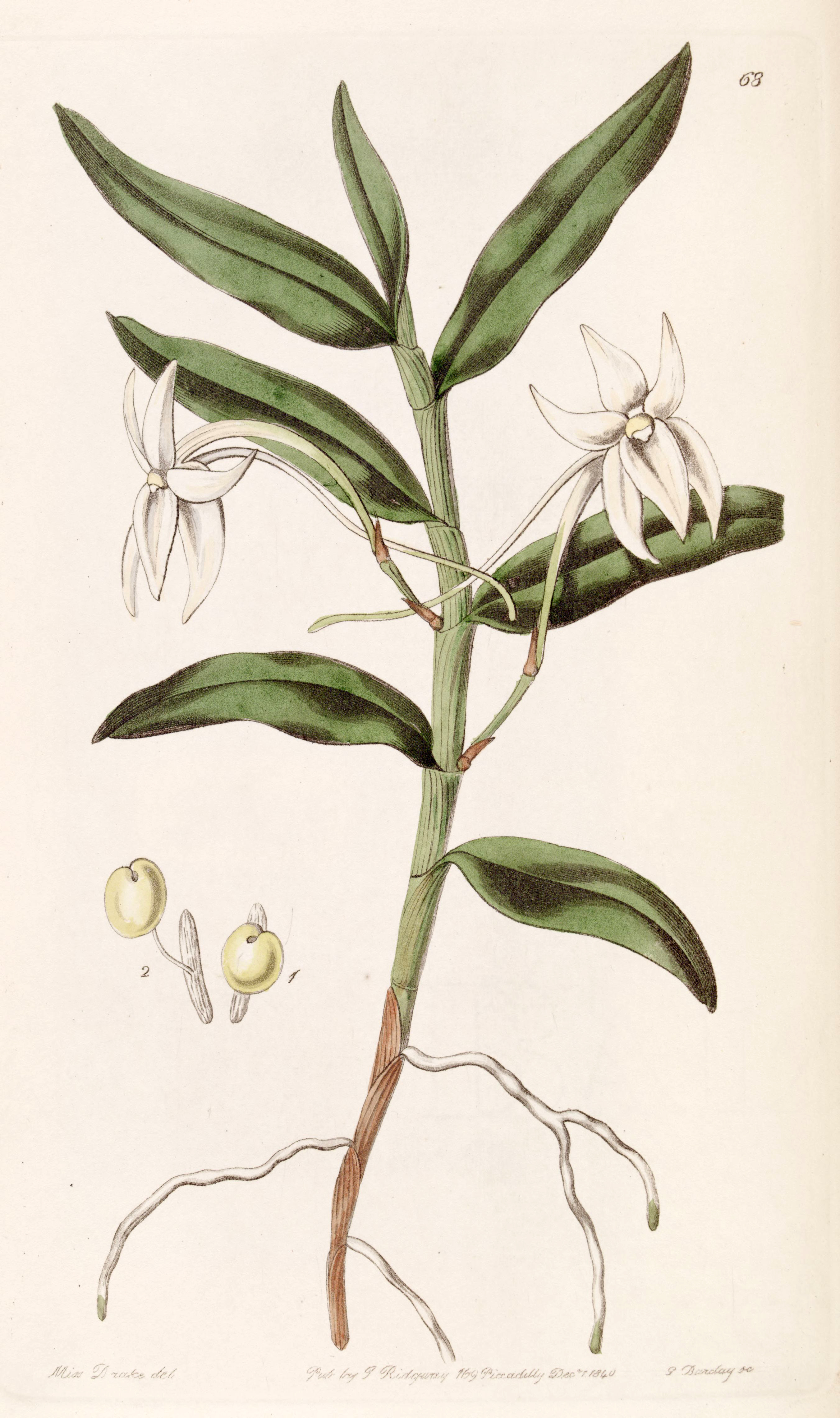 Angraecum mauritianum (as syn. Angraecum gladiifolium)